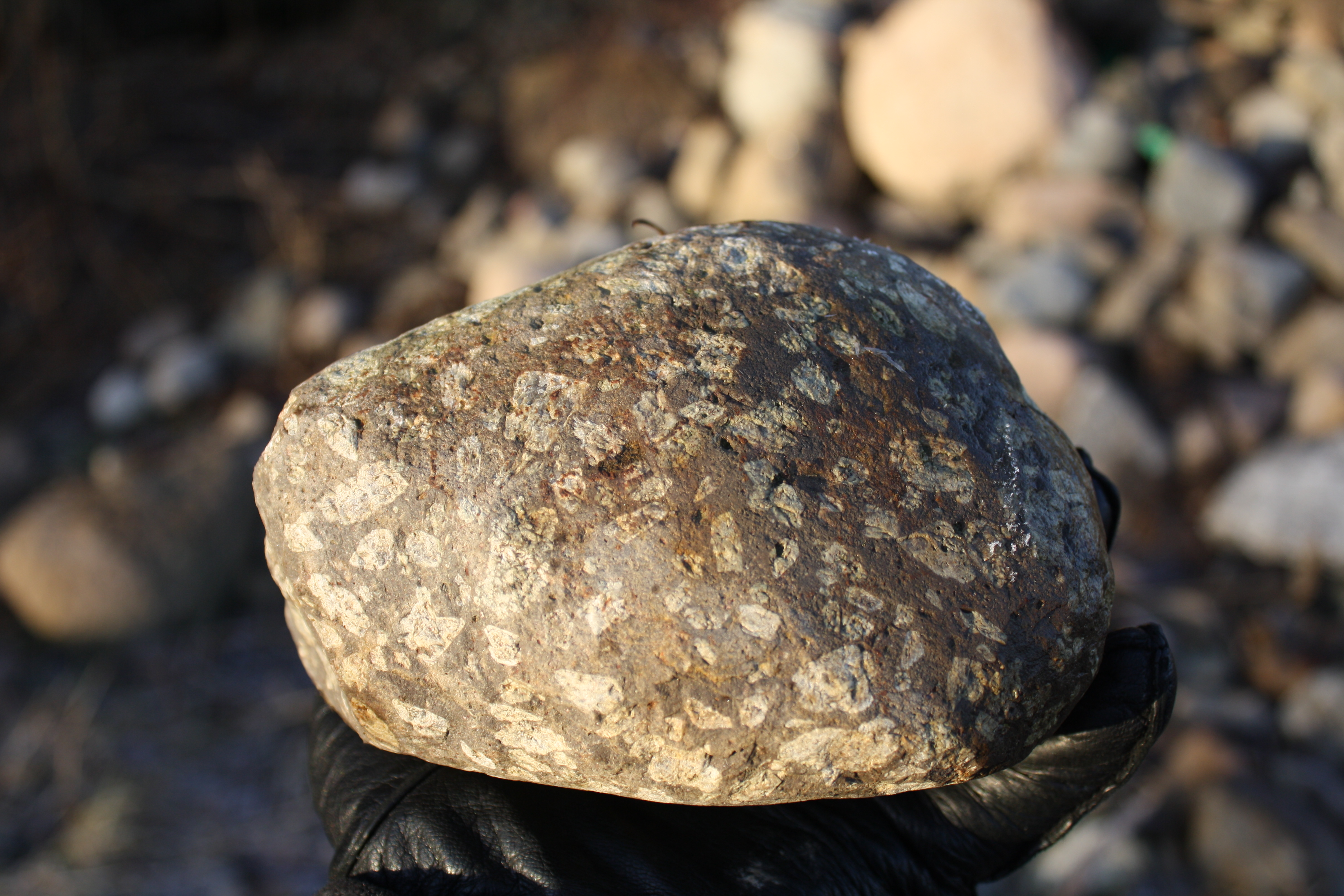 Bilde av en kilosklump med rombeporfyr jeg fant i en haug som en lokal nøtterøybonde hadde pløyd opp.